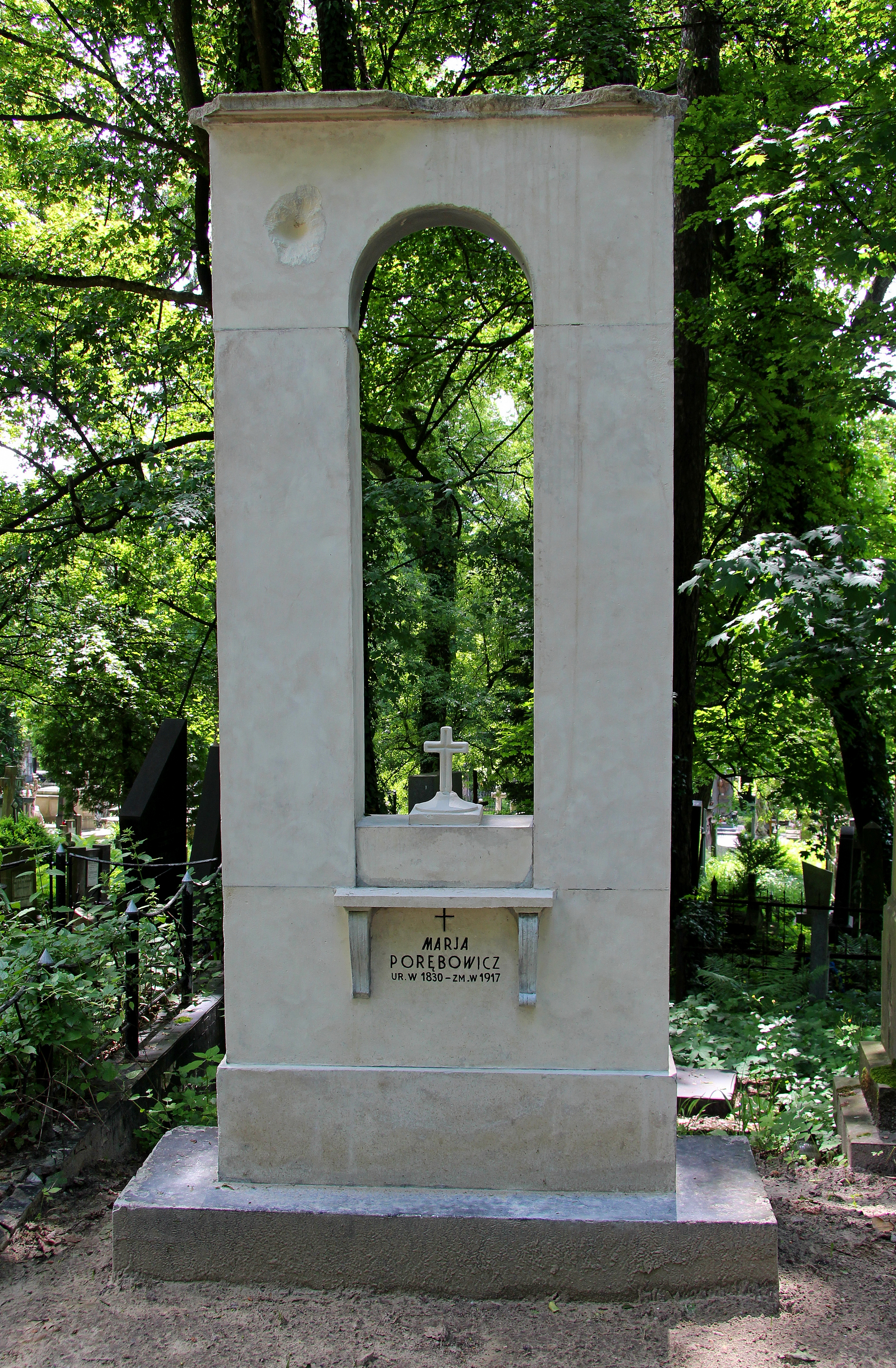 Надгробок на Личаківському цвинтарі